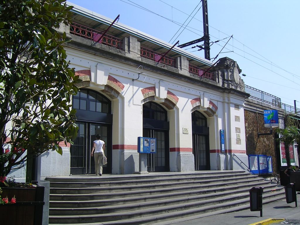 Gare, l'entrée principale, rue Joannés Photo personnelle (own work) de Marianna